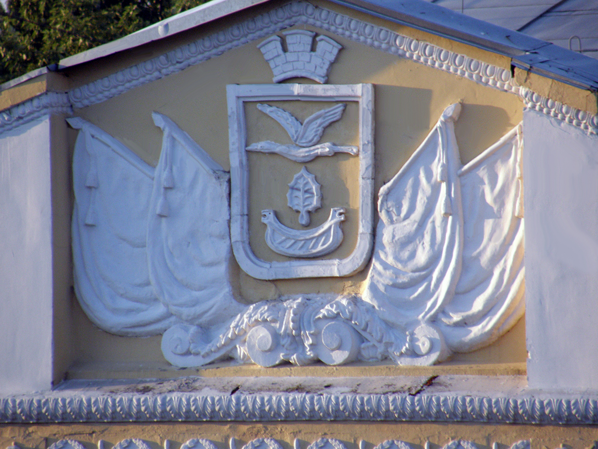 на ДК "Дарница"